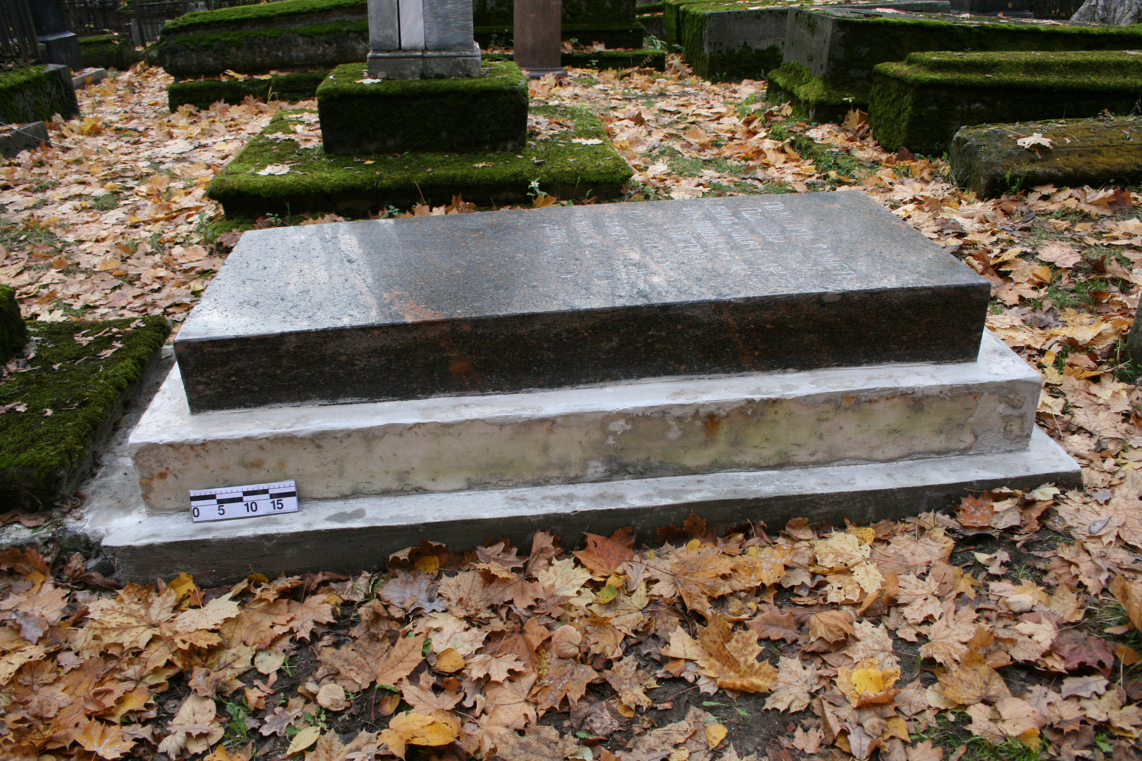 Захоронение Толстого Николая Ивановича в Донском некрополе.